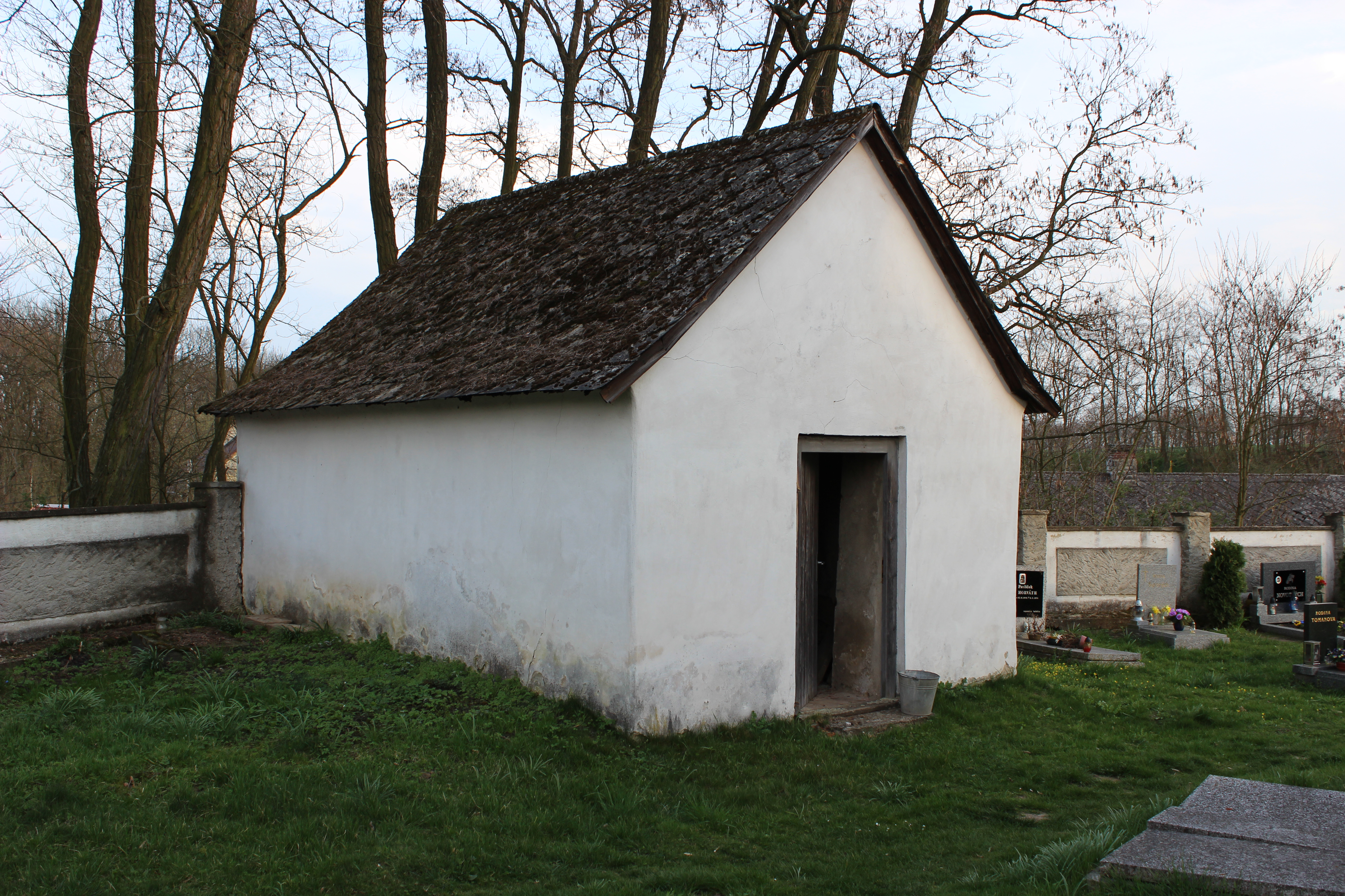 Márnice u kostela svatého Jakuba Většího v Kadlíně. This photograph was taken with a Canon EOS 600D.